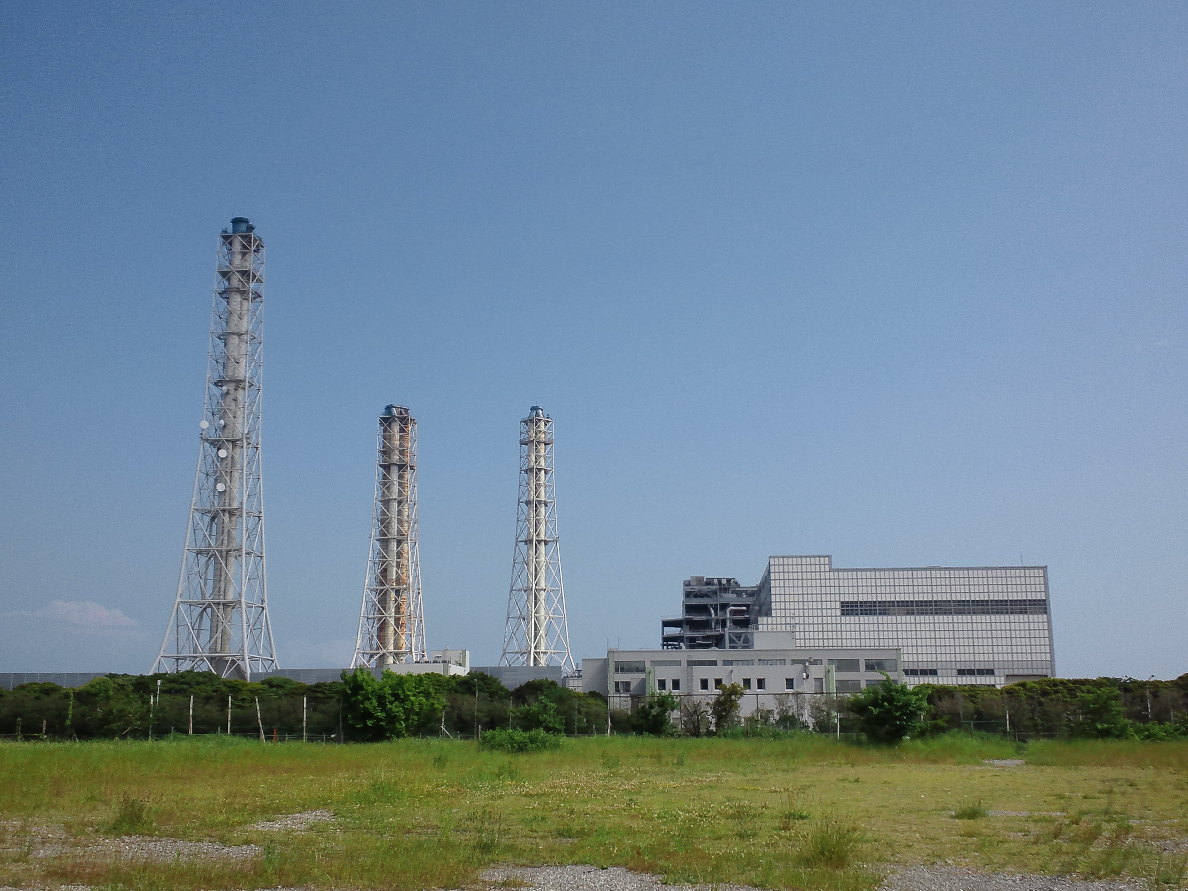 東京電力横須賀火力発電所